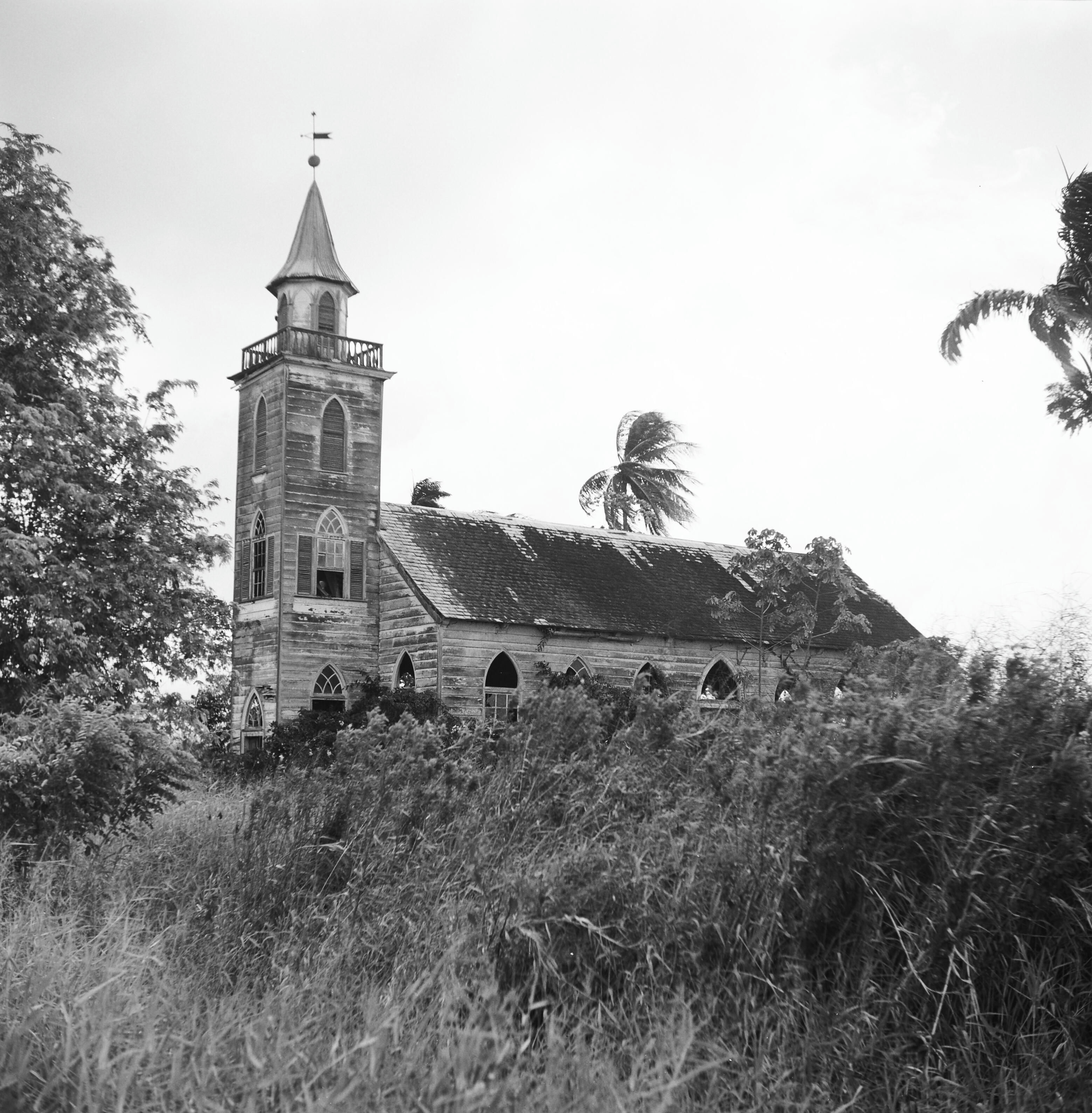 Evangelische Broedergemeente Kerk, zij aanzichtOnderwerp: kerken